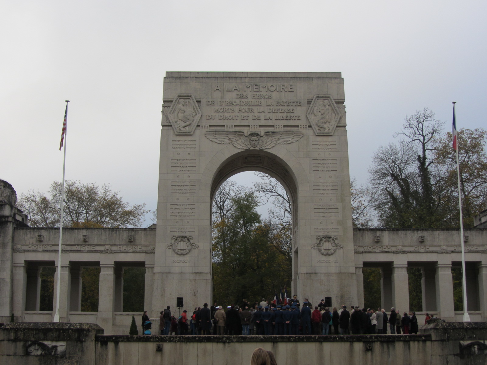 L'escadrille Lafayette au 11 novembre